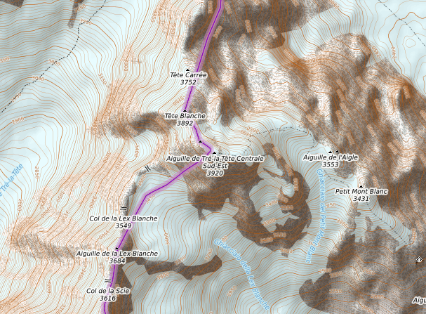 Carte réalisée sur umap This map may be incomplete, and may contain errors. Don't rely solely on it for navigation.